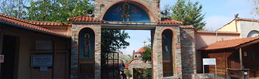 Зихнинская митрополия